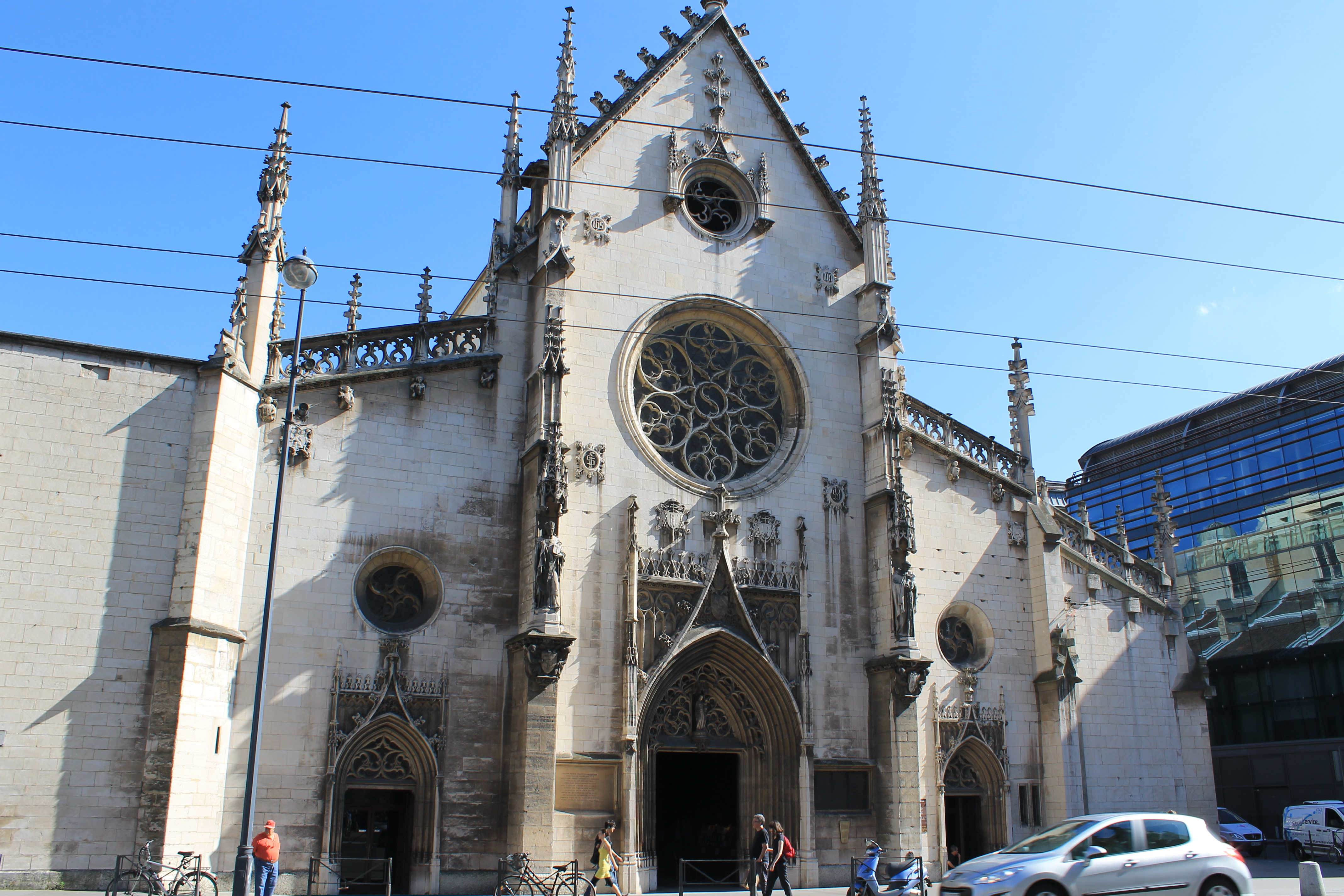 Lyon